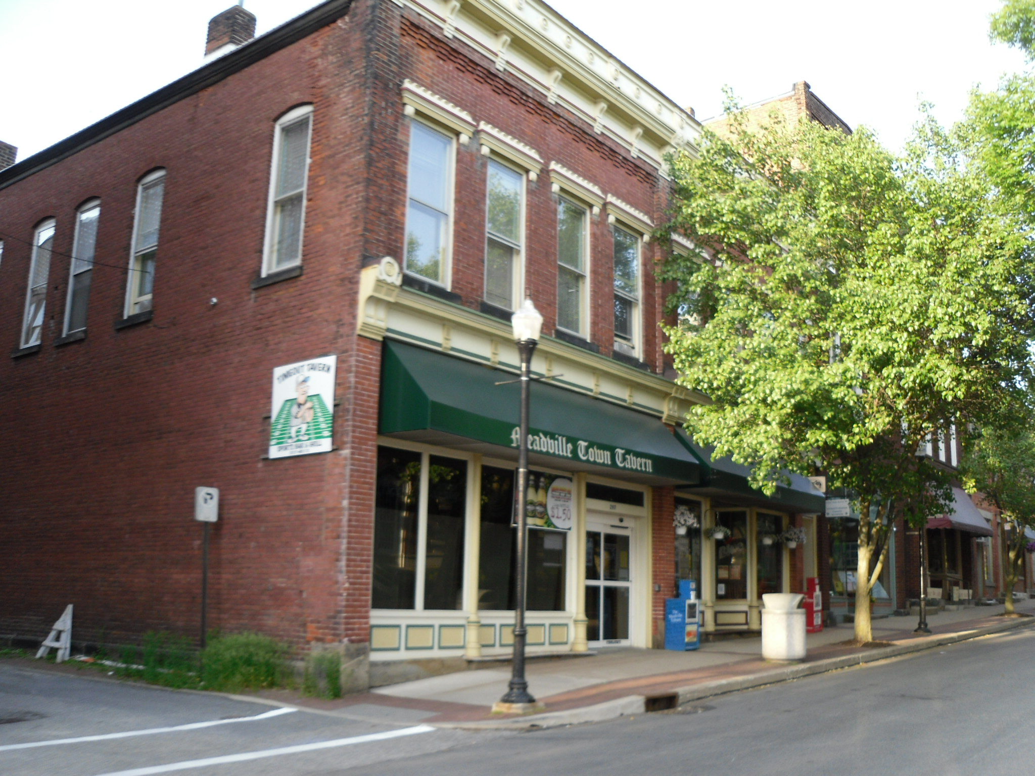 Meadville, Pennsylvania